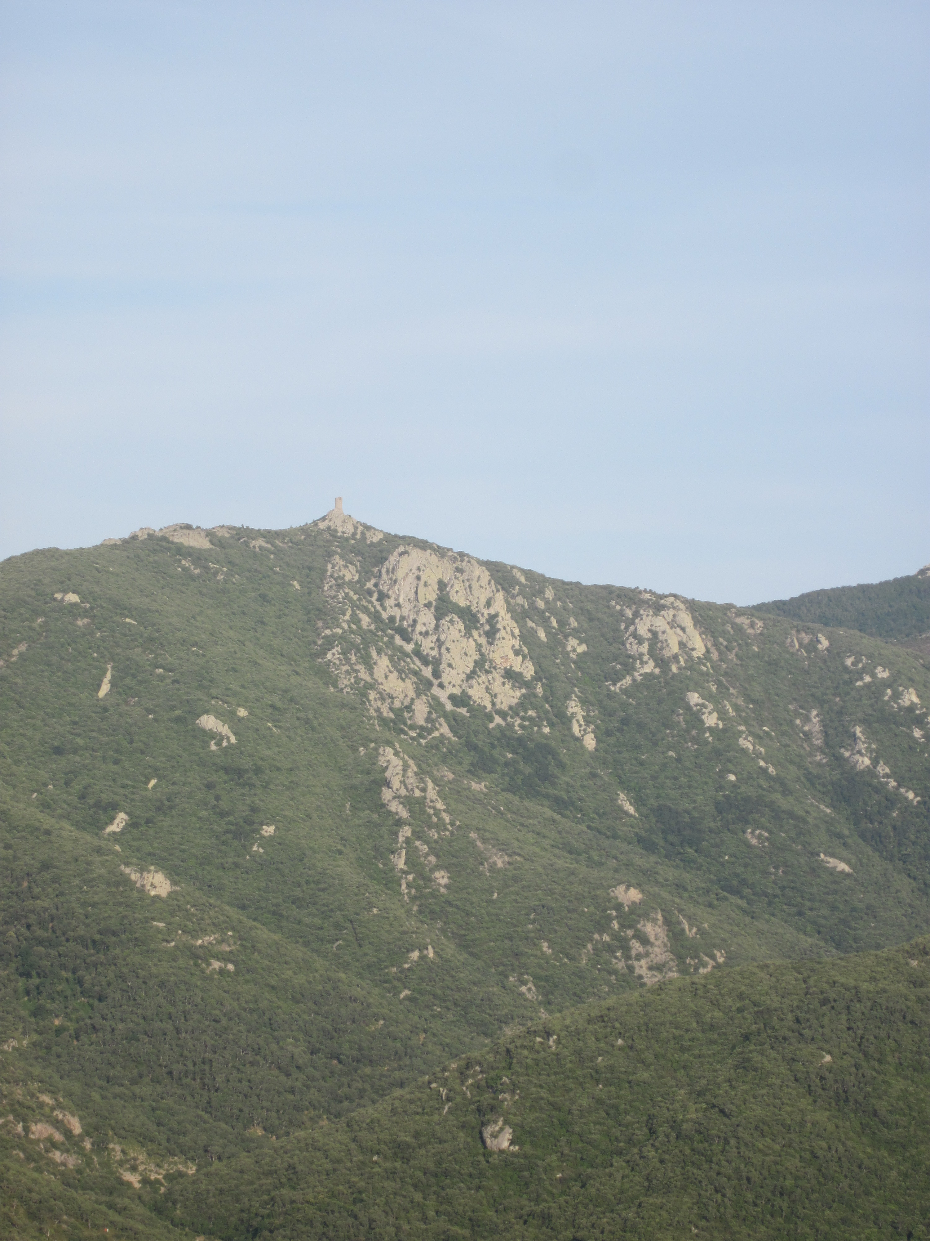 Tour de la Massane